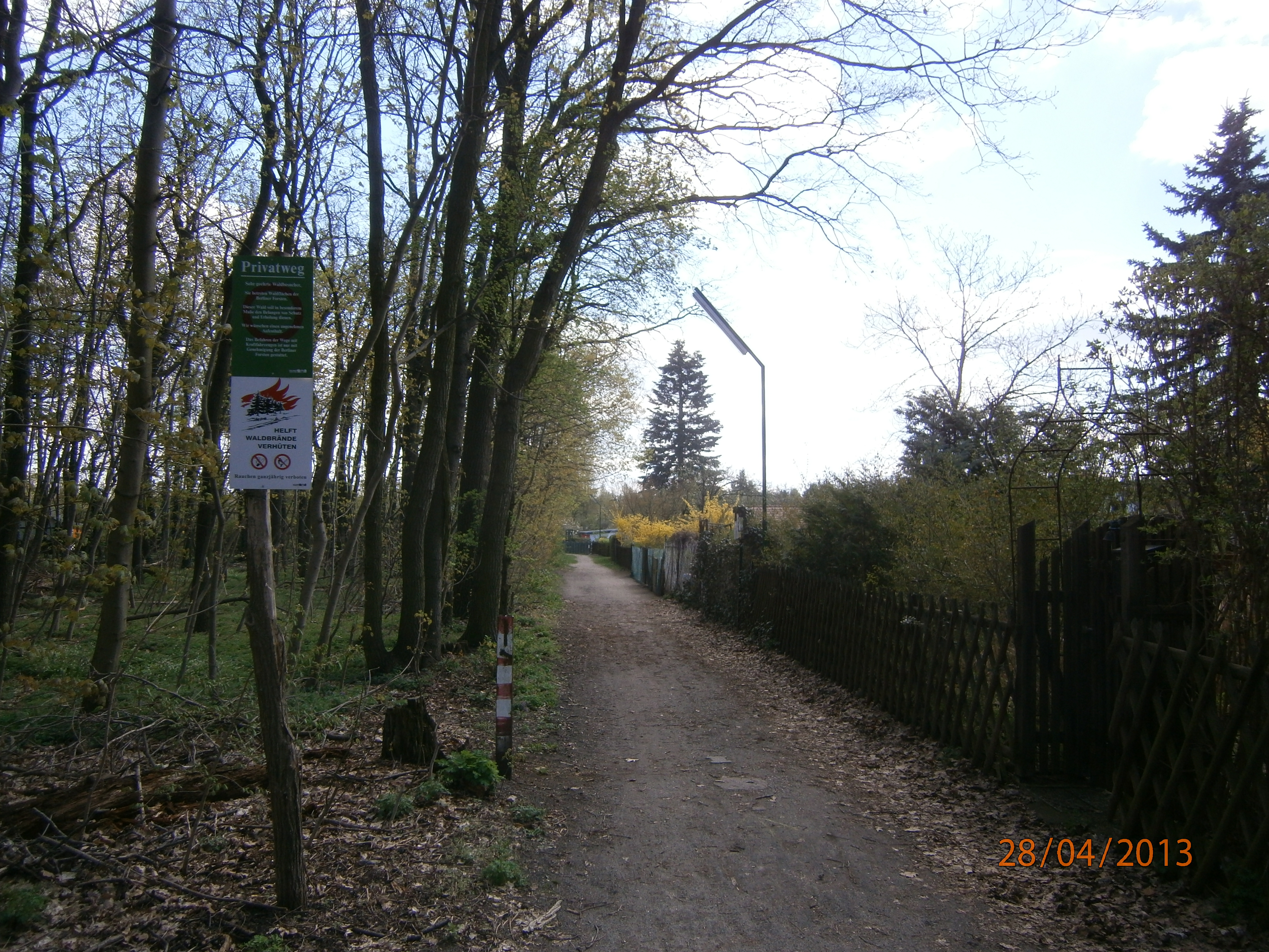 Pappelweg ist eine Privatstraße im Ortsteil Berlin-Nikolassee (hier vom Königsweg nach Süden gesehen, rechts liegt die KGA Schlachtensee-Süd, links im Bild das Waldstück des Hundeauslaufgebietes zur Benschallee/ Lloyd-G.-Wells-Straße. Gegenüber der Straße Widenhof)